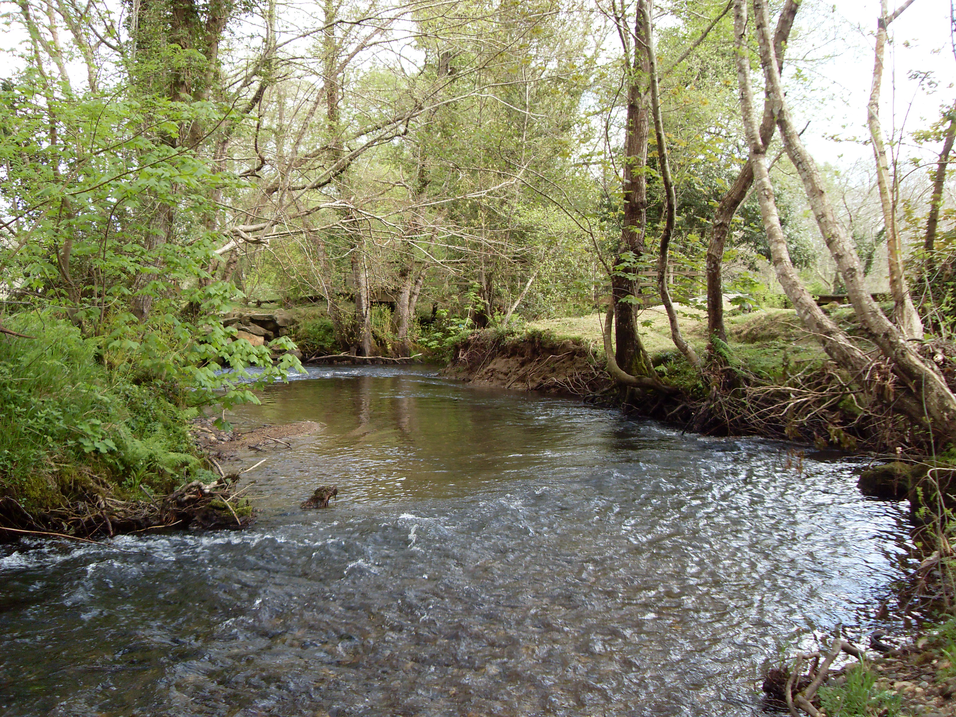 Río Mera ao paso pola Illa de Mera na parroquia de Mera de Abaixo no concello de Ortigueira